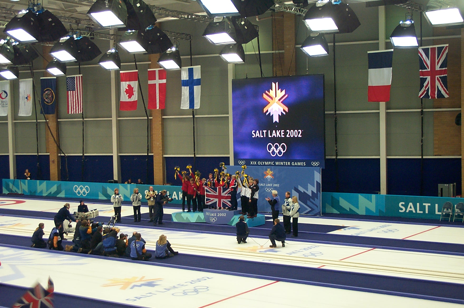 SLC2002 Curling 14